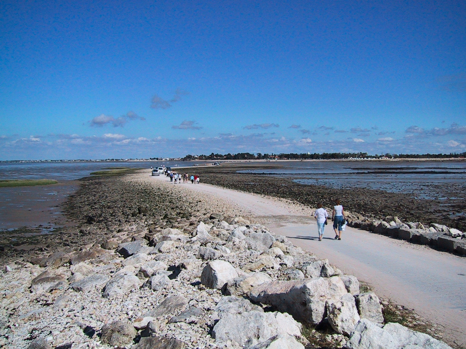 La passe de l'Île Madame à marée basse. Charente-Maritime (17), France